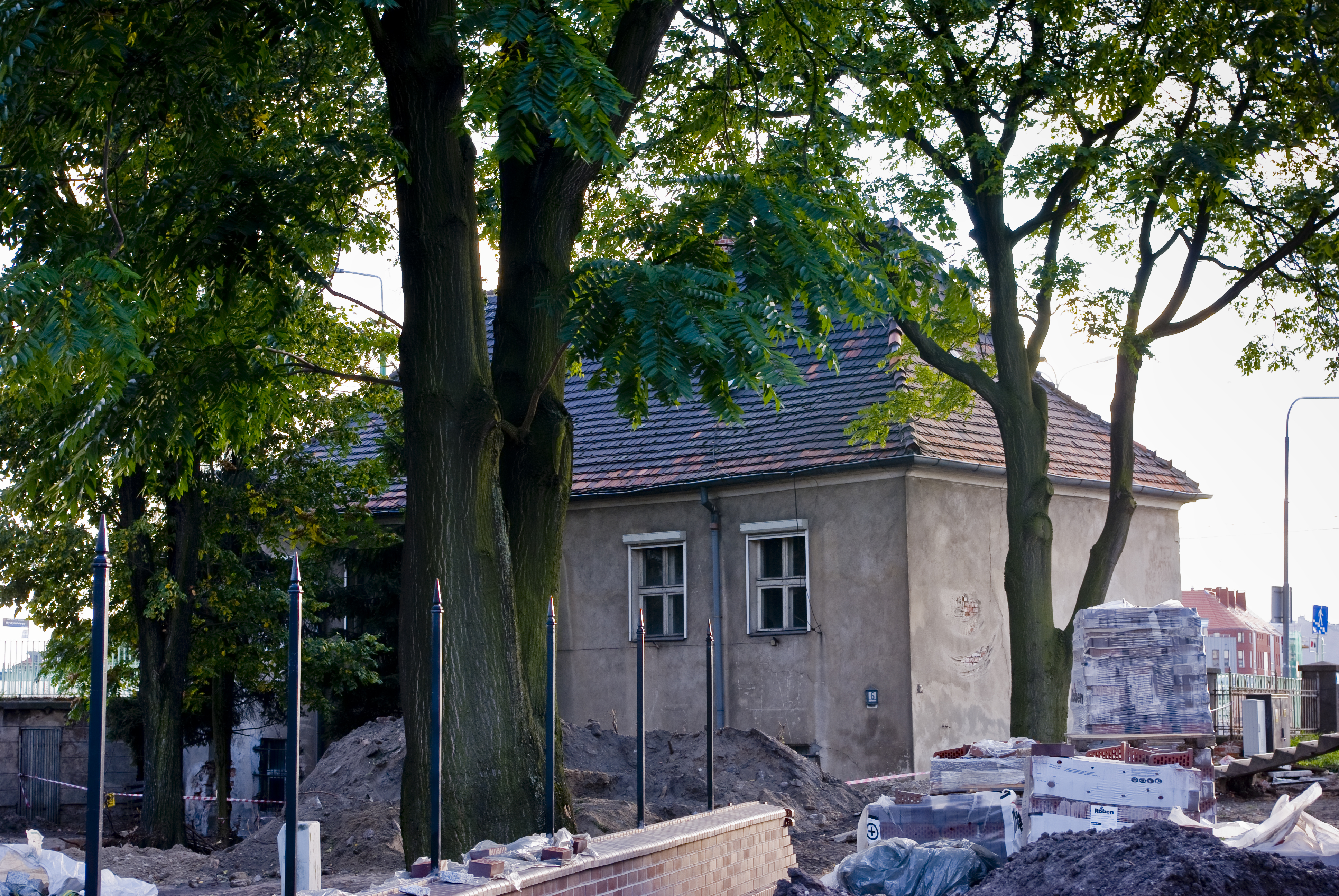 Poznań, ul. Ostrów Tumski 6 - kanonia (zabytek nr A062)